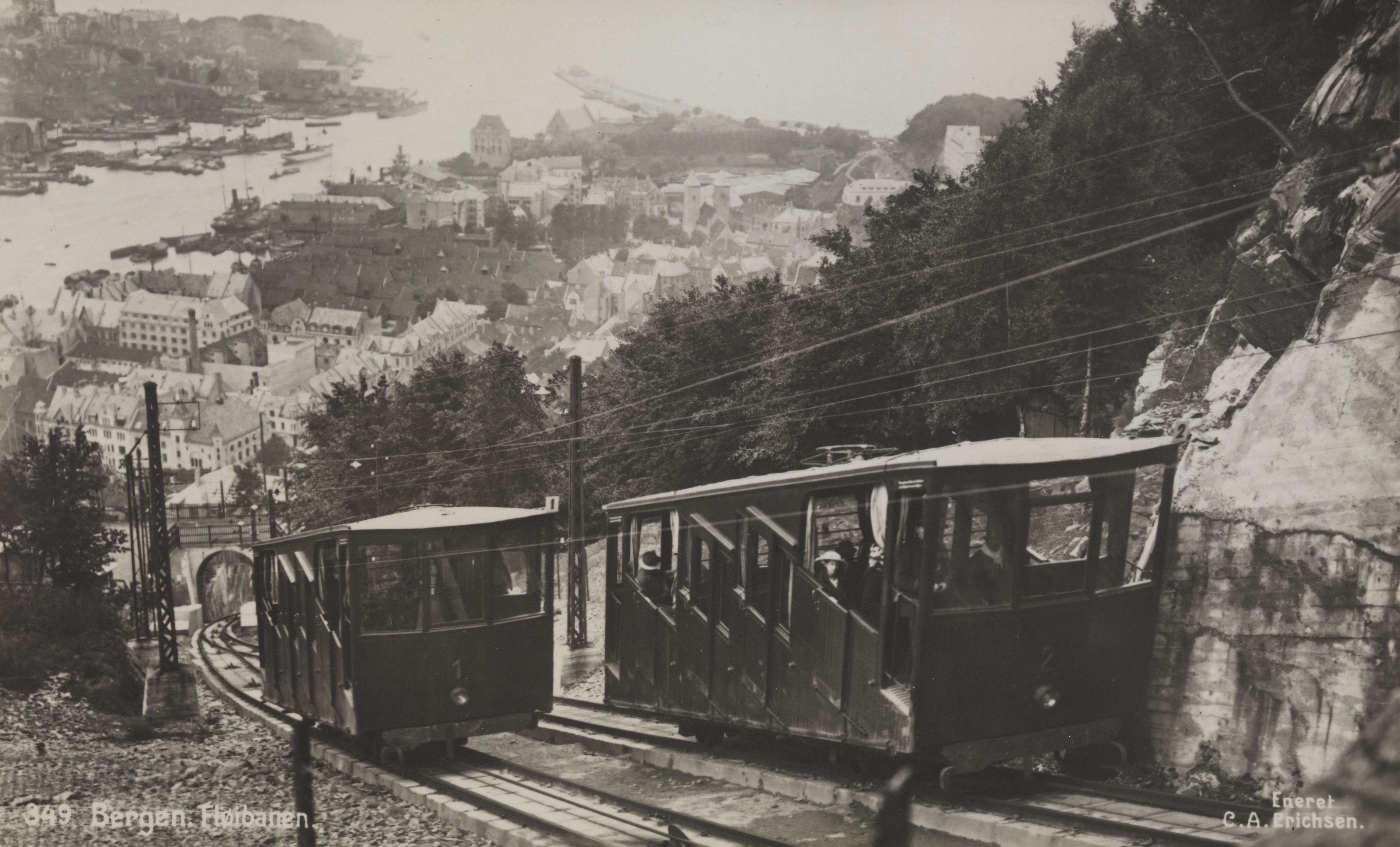 Bildet er hentet fra Nasjonalbibliotekets bildesamling Fløyen, Bergen, Hordaland